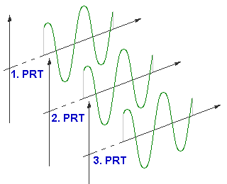 Kohärente Sendeimpulse aus (hier) drei Impulsperioden (PRT) beginnen immer mit einer definierten (hier gleichen) Phase